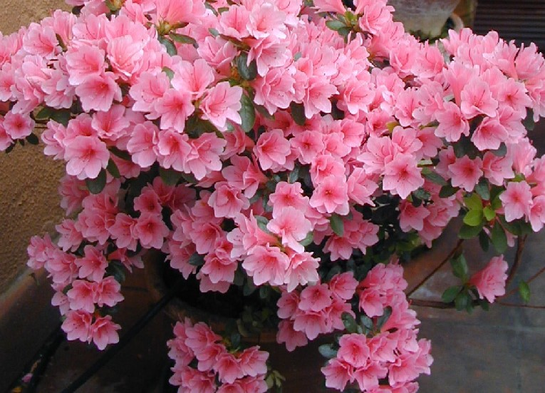 Fiori di Azalea - Roma